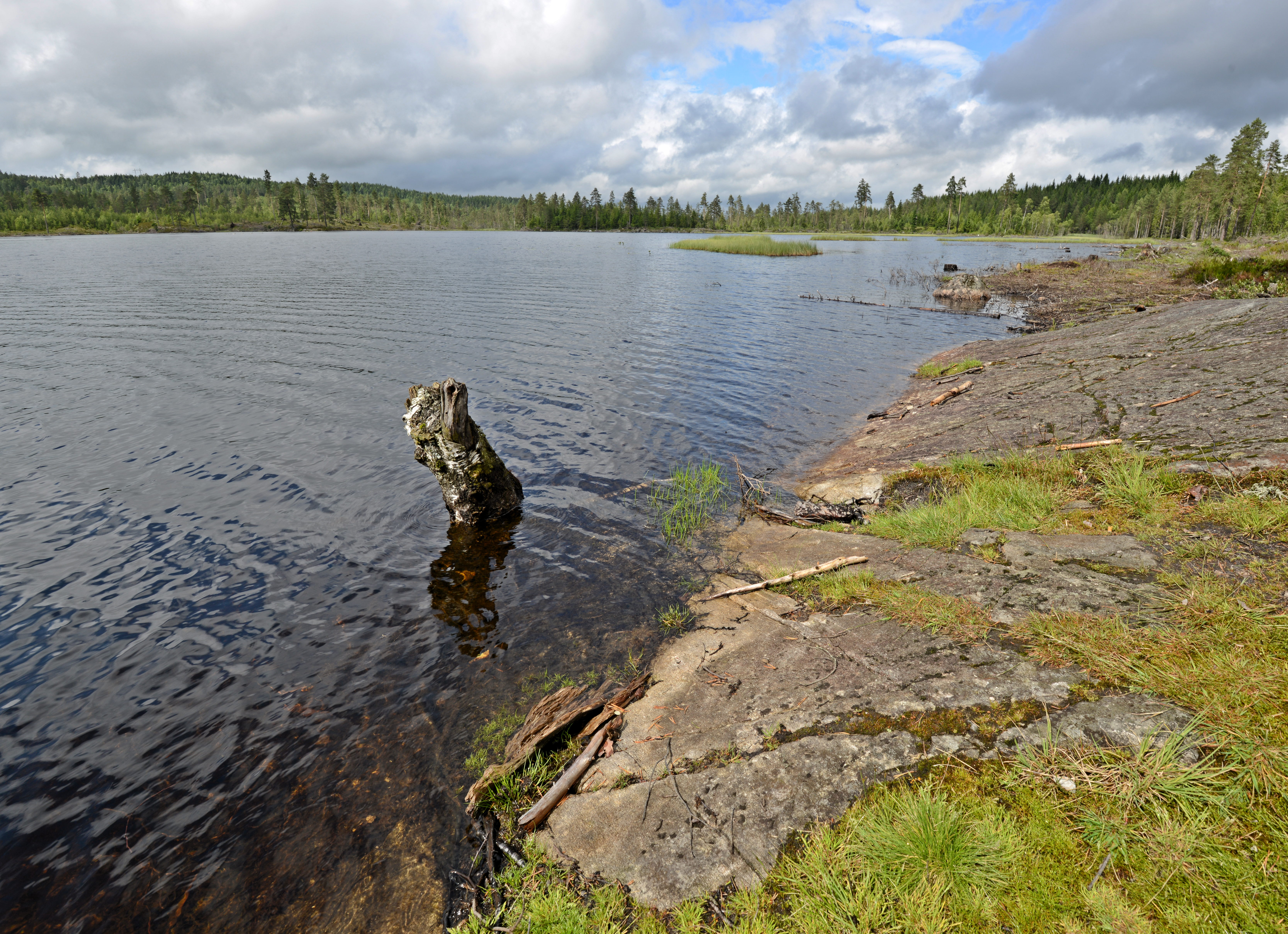 Buvatnet i Gjerdrum